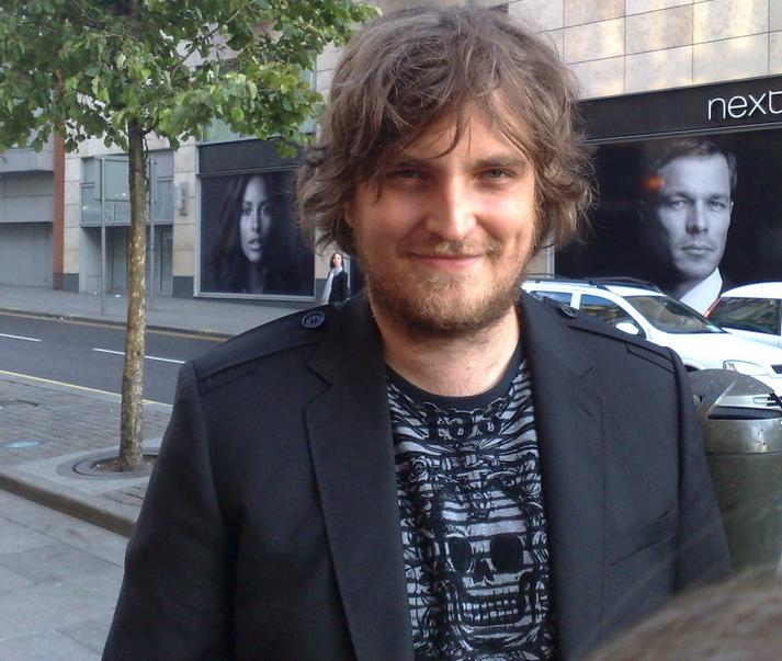 Foto de James Walsh cantante de Starsailor